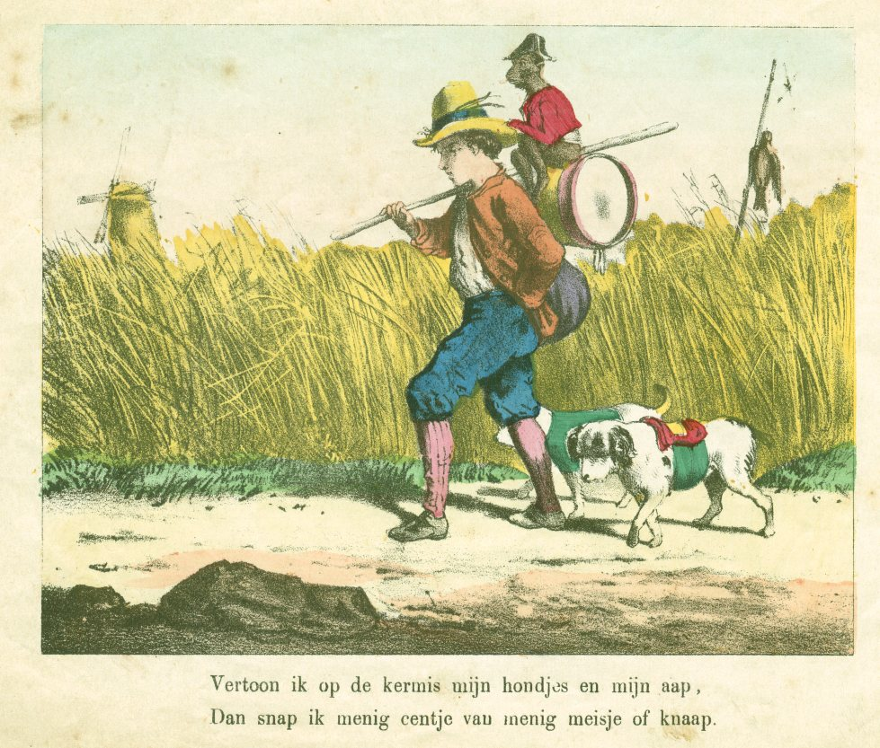 litho uit prentenboek, 1883, eigen prentenboek, zelf ingescand. Het betreft een prentenboek met de titel: "Tooneelen uit vreemde landen, 8 plaatjes met versjes. Haarlem, I. de Haan." Onderaan op de voorkant staat: "Lith. Emrik & Binger".